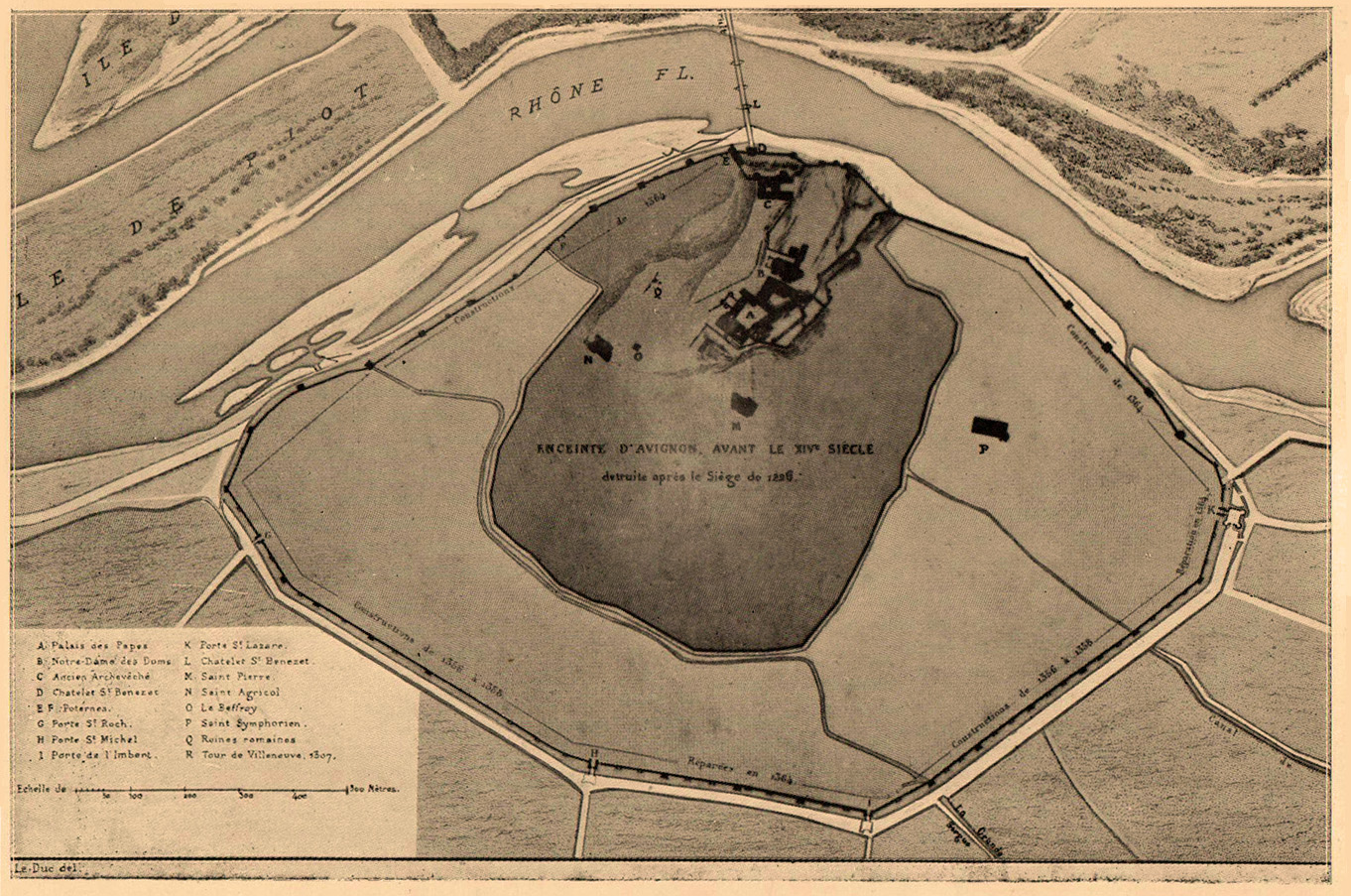 Plan des remparts d'Avignon du XIIIe et du XIVe siècle dressé par Viollet-le-Duc